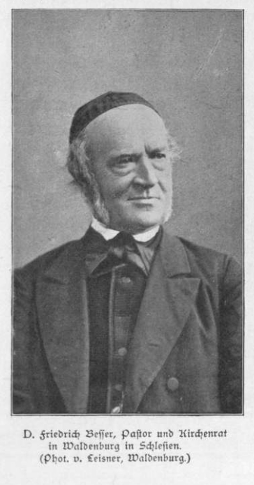 Photo - der protestantische Pfarrer Wilhelm Friedrich Besser